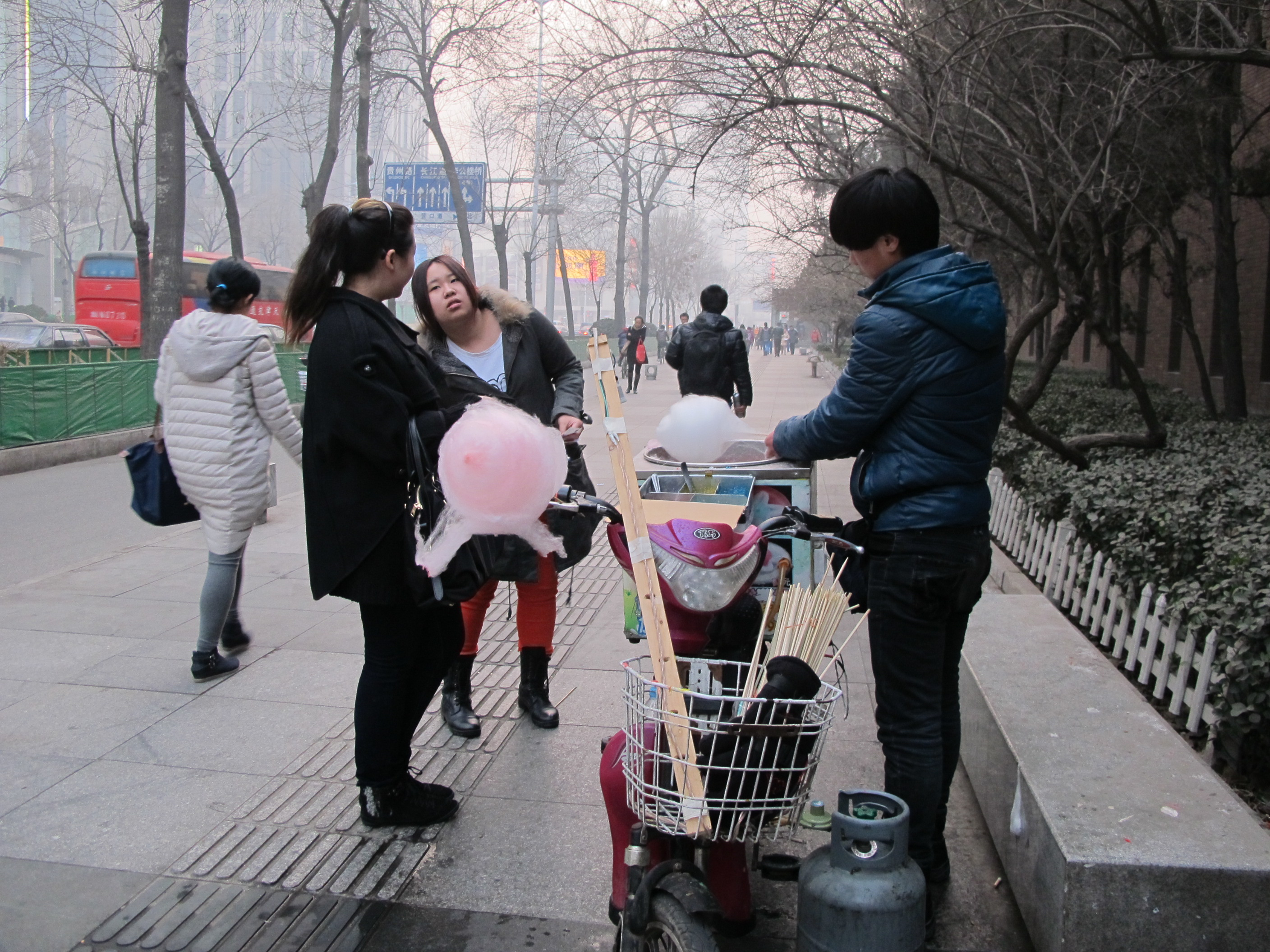 Vendeur de barbe-à-papa dans la rue. Nanjing lu, Heping, Tianjin, Chine. La crise de pollution de l'air du 25 février 2014 est visible. 中国天津市南京路棉花糖